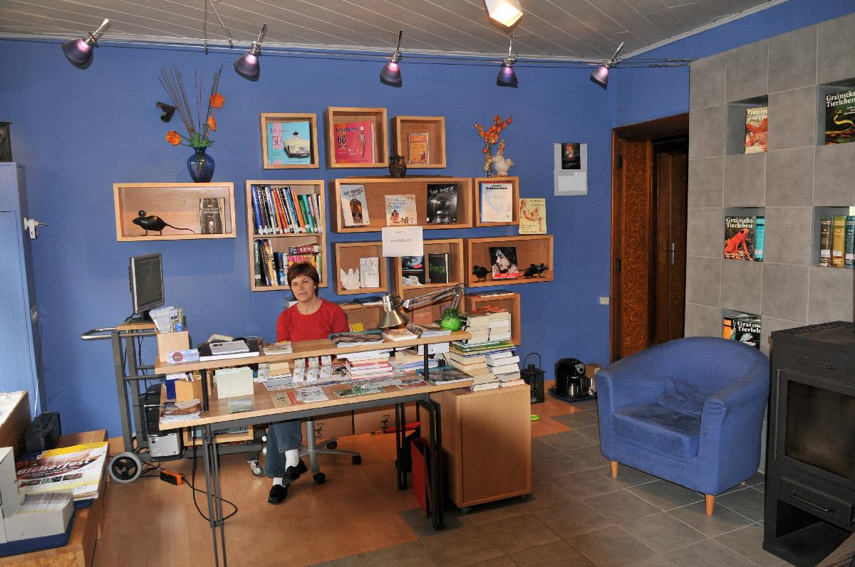 D'Ourdall-Bibliothéik vu bannen, Veianen.